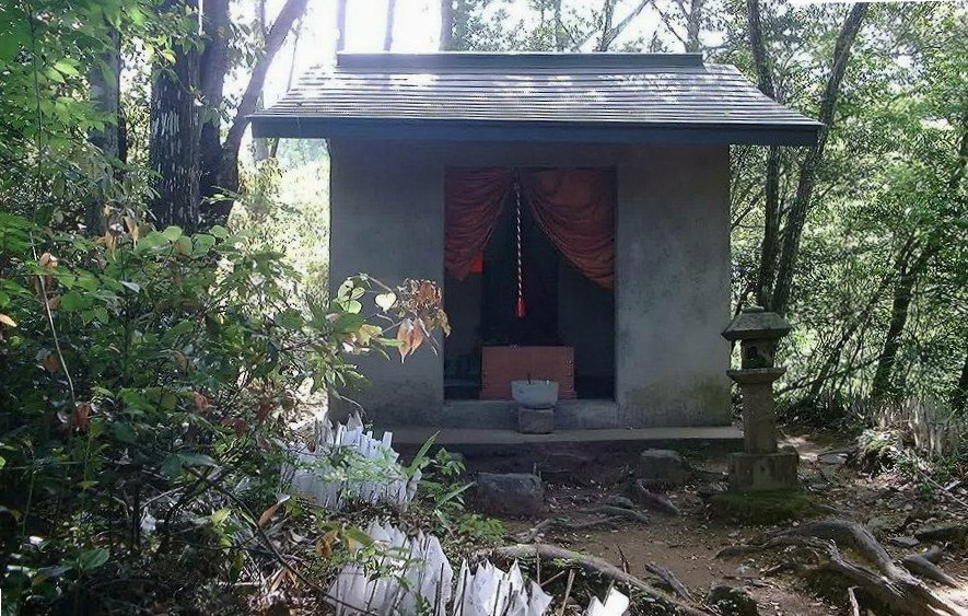 南光院は田んぼの中を通った林の中にある